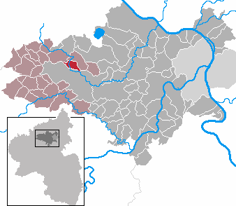 Sankt Johann in Rhineland-Palatinate - district Mayen-Koblenz